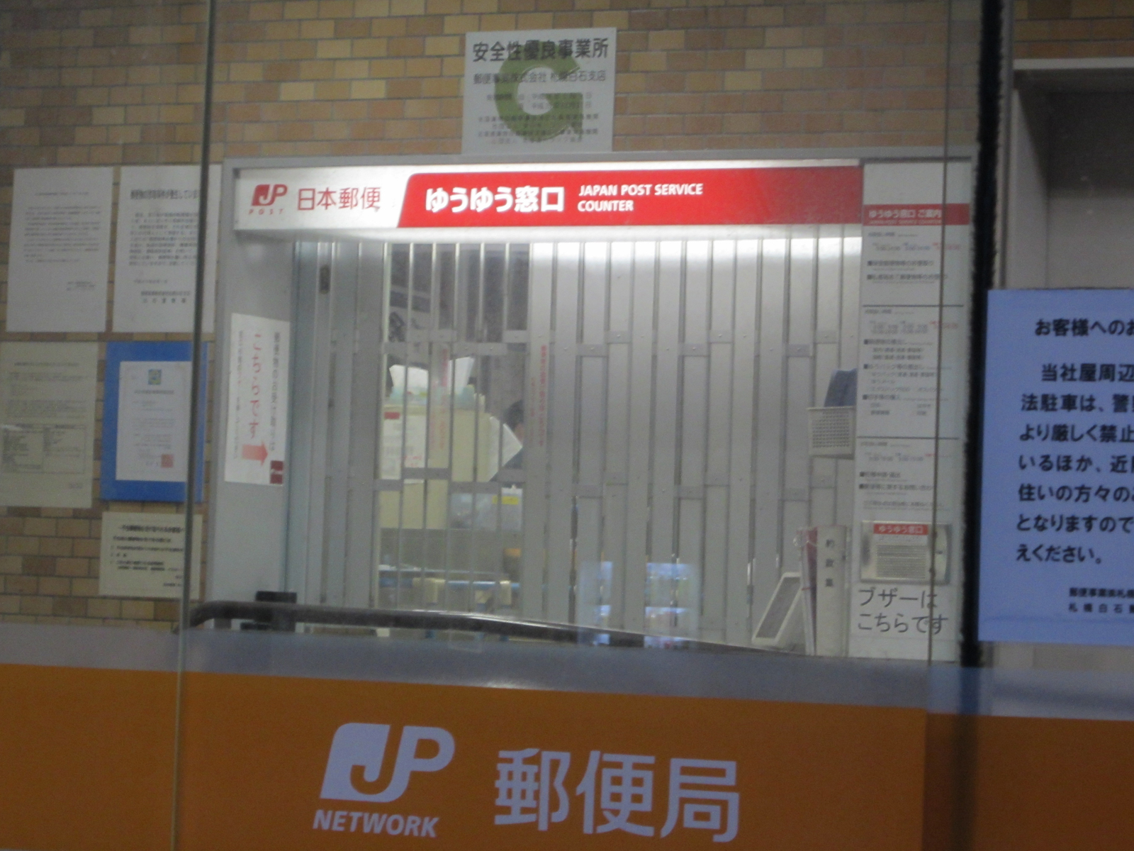 ゆうゆう窓口（北海道札幌白石郵便局）